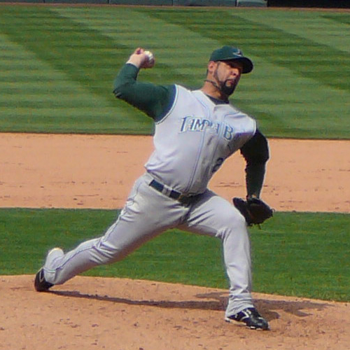 Al Reyes